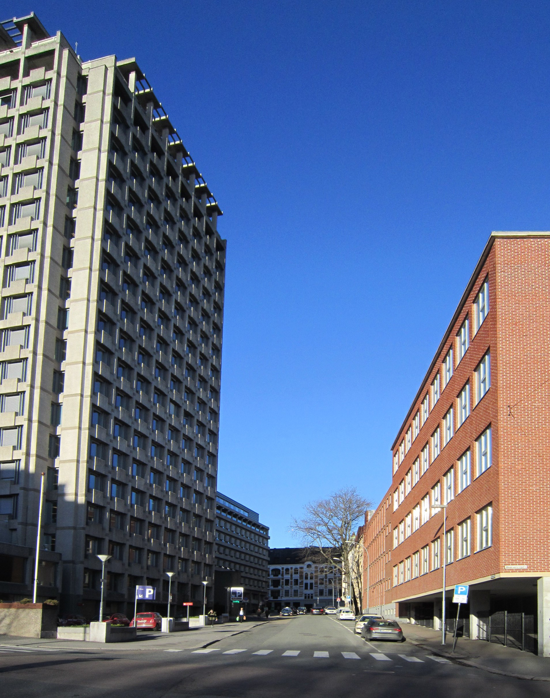 Solligata i Oslo, med Ind-Eks-huset til venstre